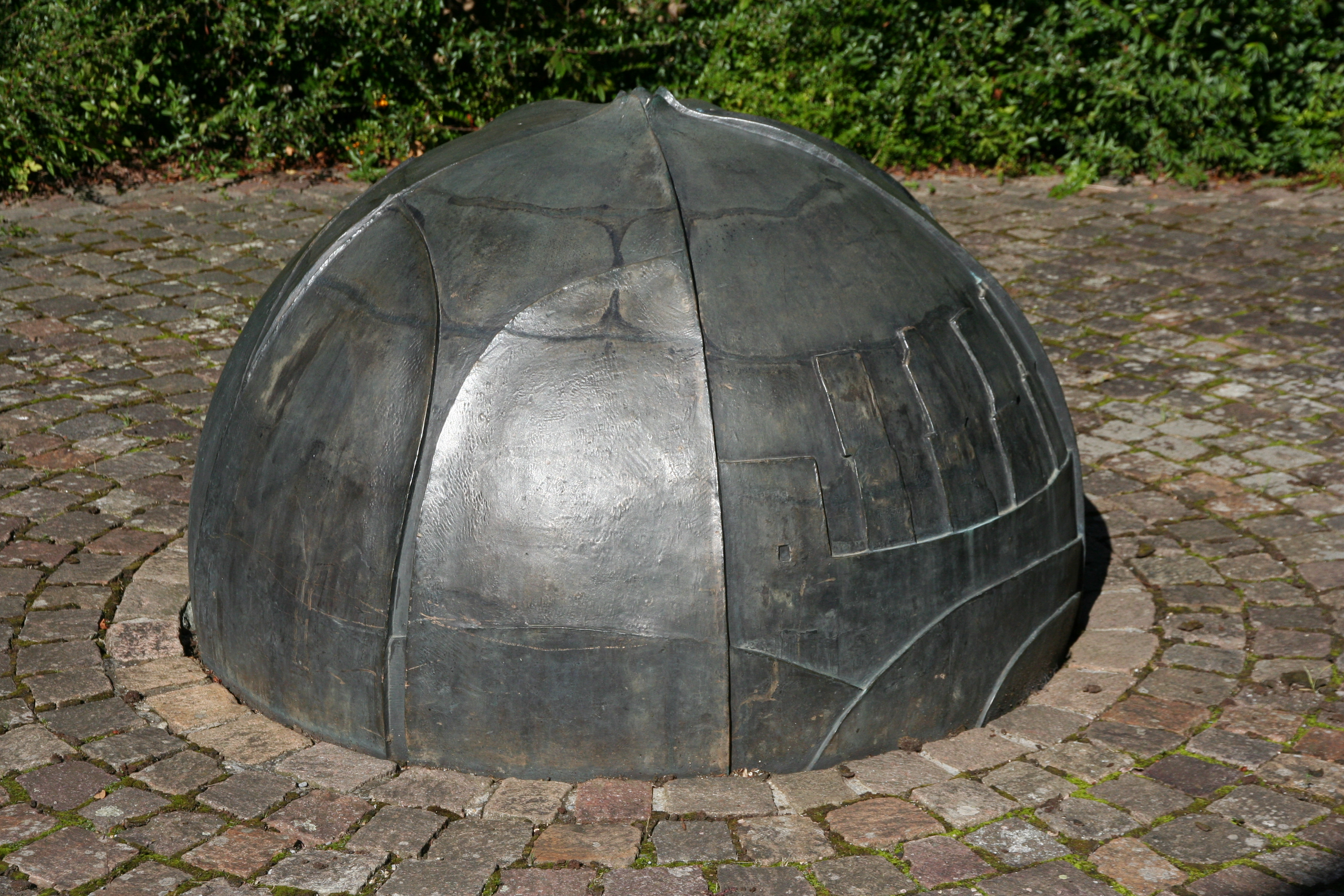 Römisch-katholische Kirche St. Franziskus Kempraten in Rapperswil-Jona